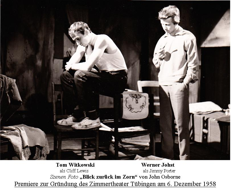 Szenenfoto der Gründungspremiere "Blick zurück im Zorn" von John Osborne im Zimmertheater Tübingen "der Thespiskarren" 6.12.1958